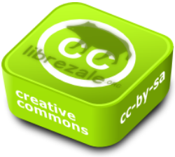 Librezale webguneko lizentzia. CC-BY-SA 3.0